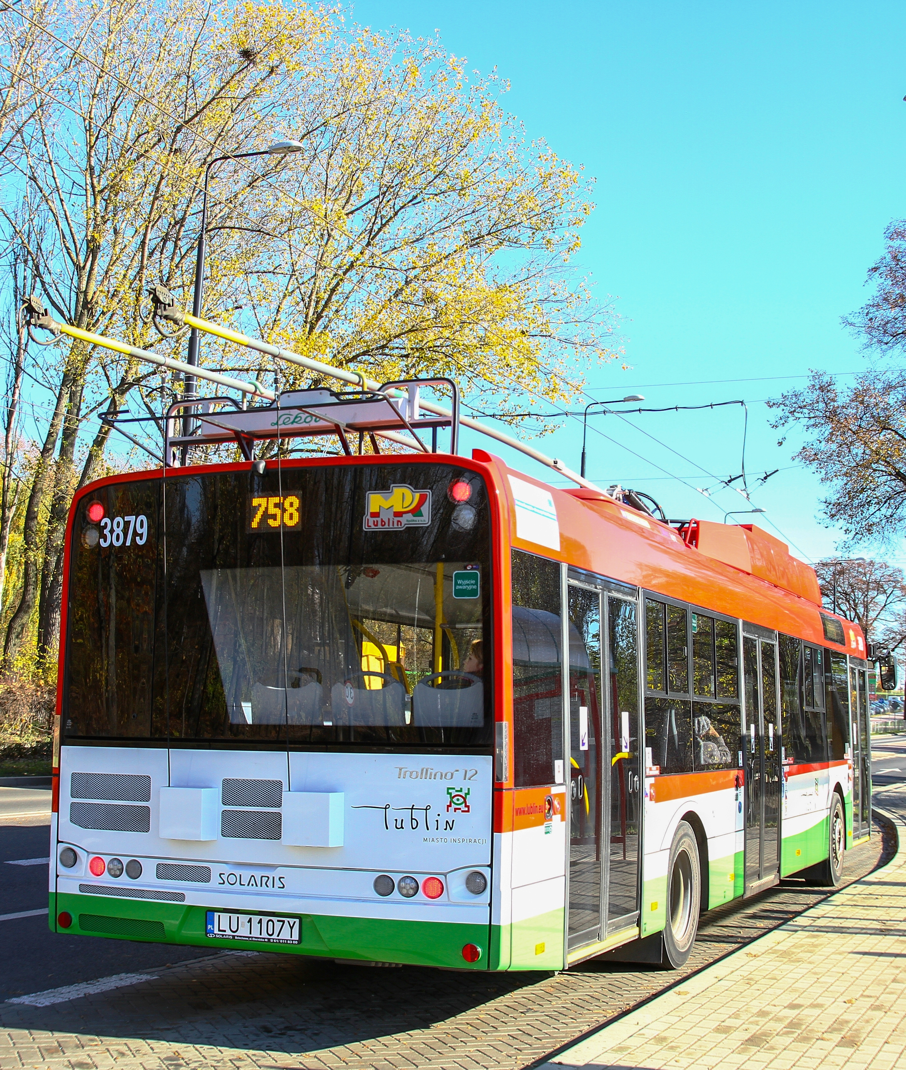 Trolejbus Solaris Trollino 12m